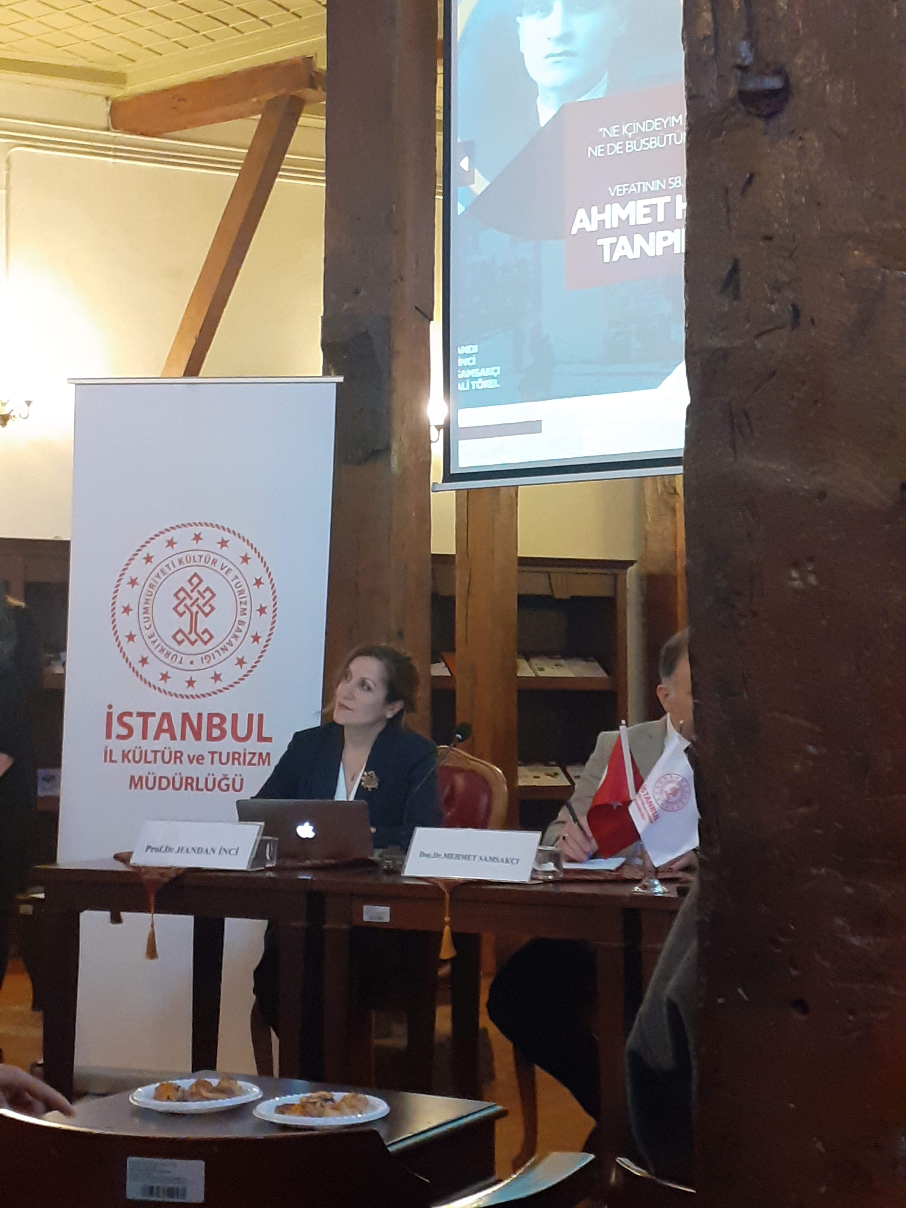 Handan İnci Bâbıâli Konuşmaları'nda